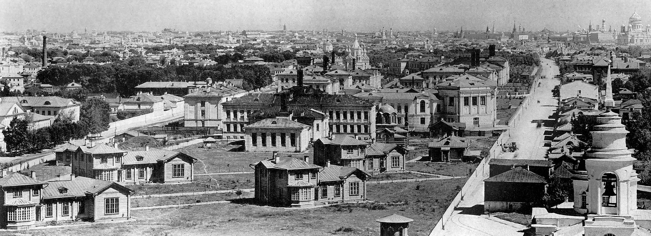 Большая Царицинская улица, вид со стороны Новодевичьего монастыря